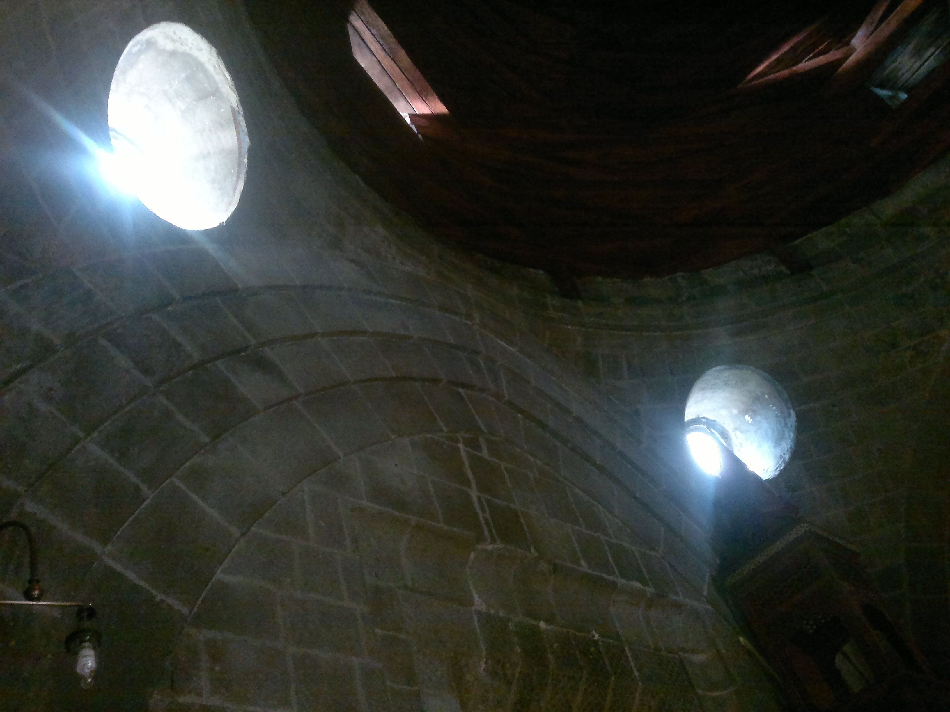 Erzurum Ulu Camii Filgözü Pencereler iç görünüm